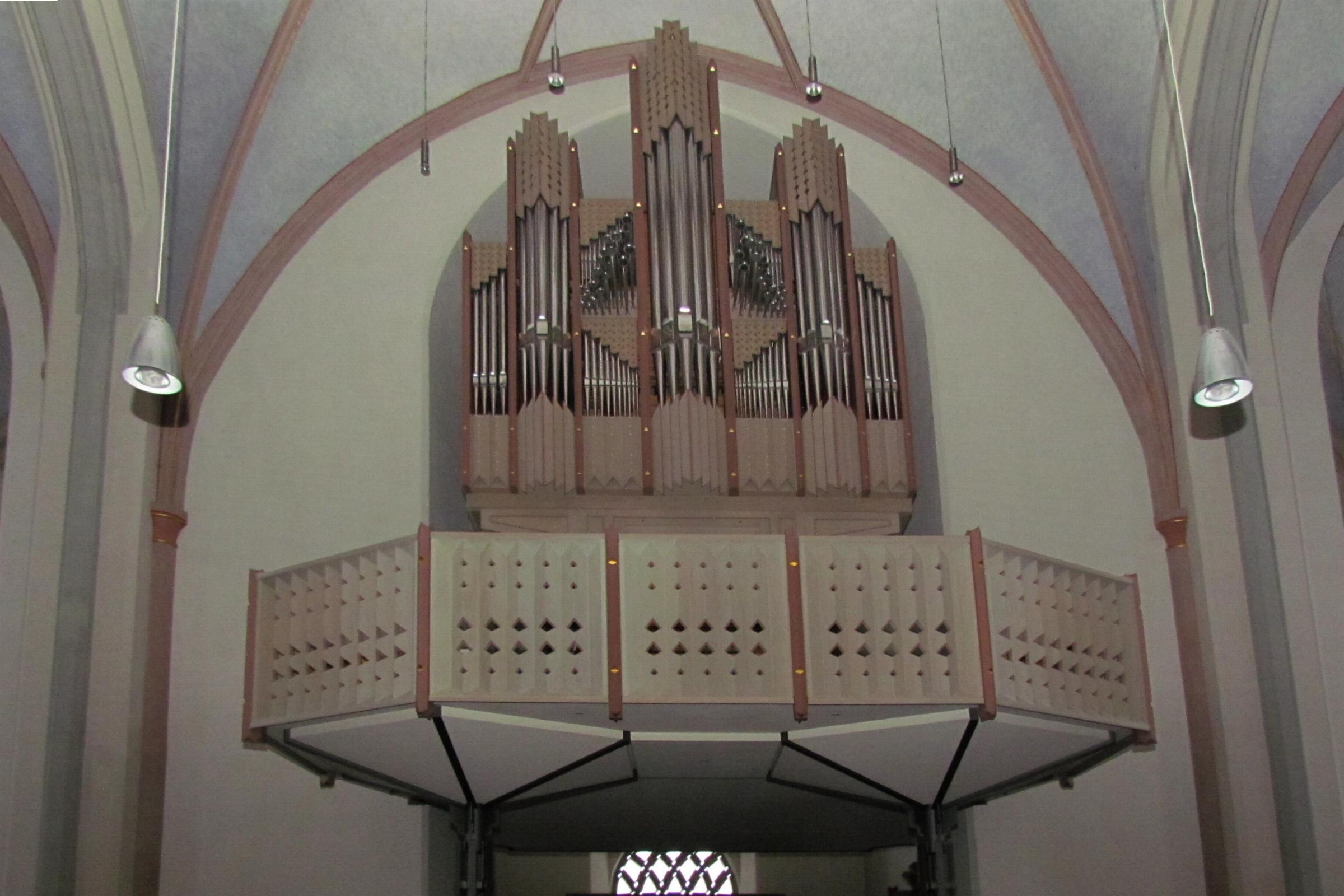 Orgel in der Kirche Heinsberg